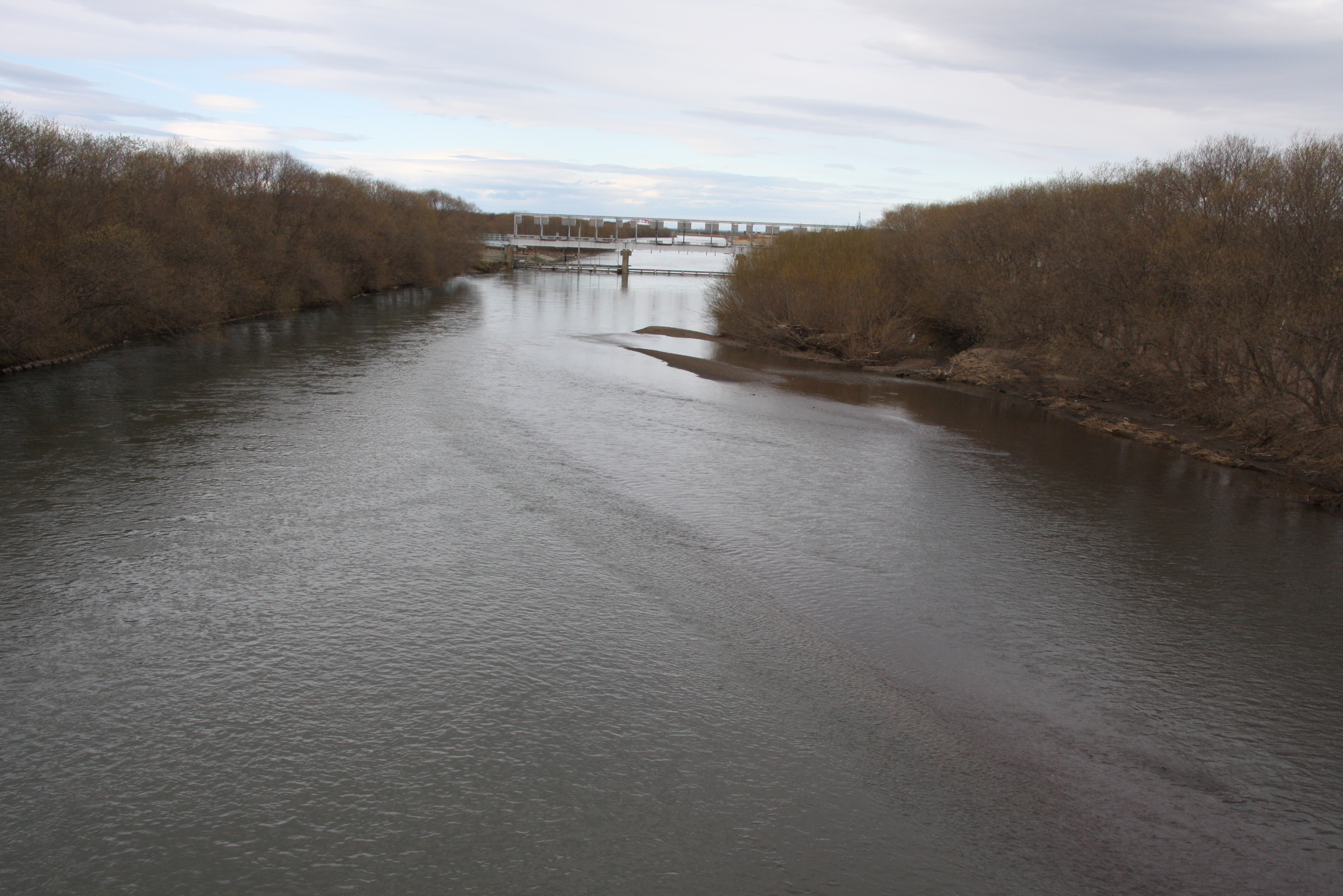 標津川 サーモン橋より下流